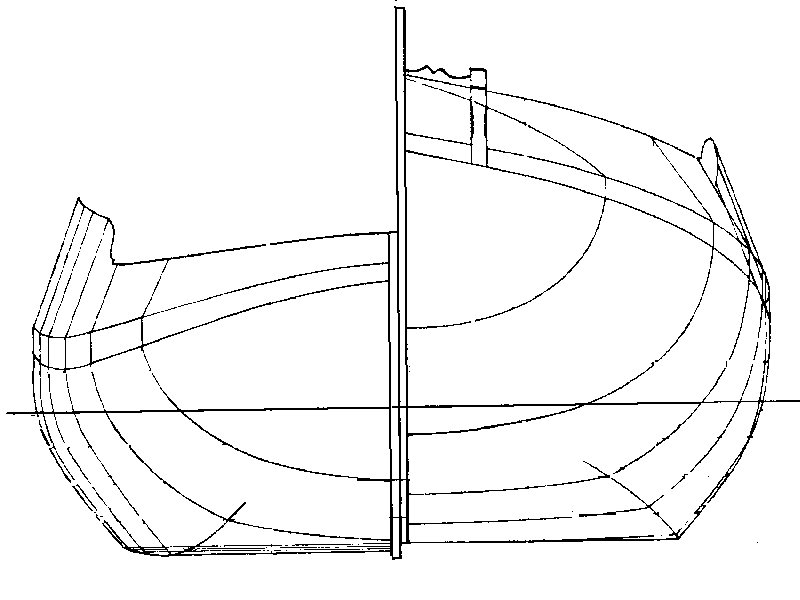 Wieringeraak: Een groot (meer dan 10 meter) visserschip gebruikt door de vissers van het voormalige eiland Wieringen. Het was korter maar breder dan de lemsteraak en had een platte bodem, om droog te kunnen vallen.